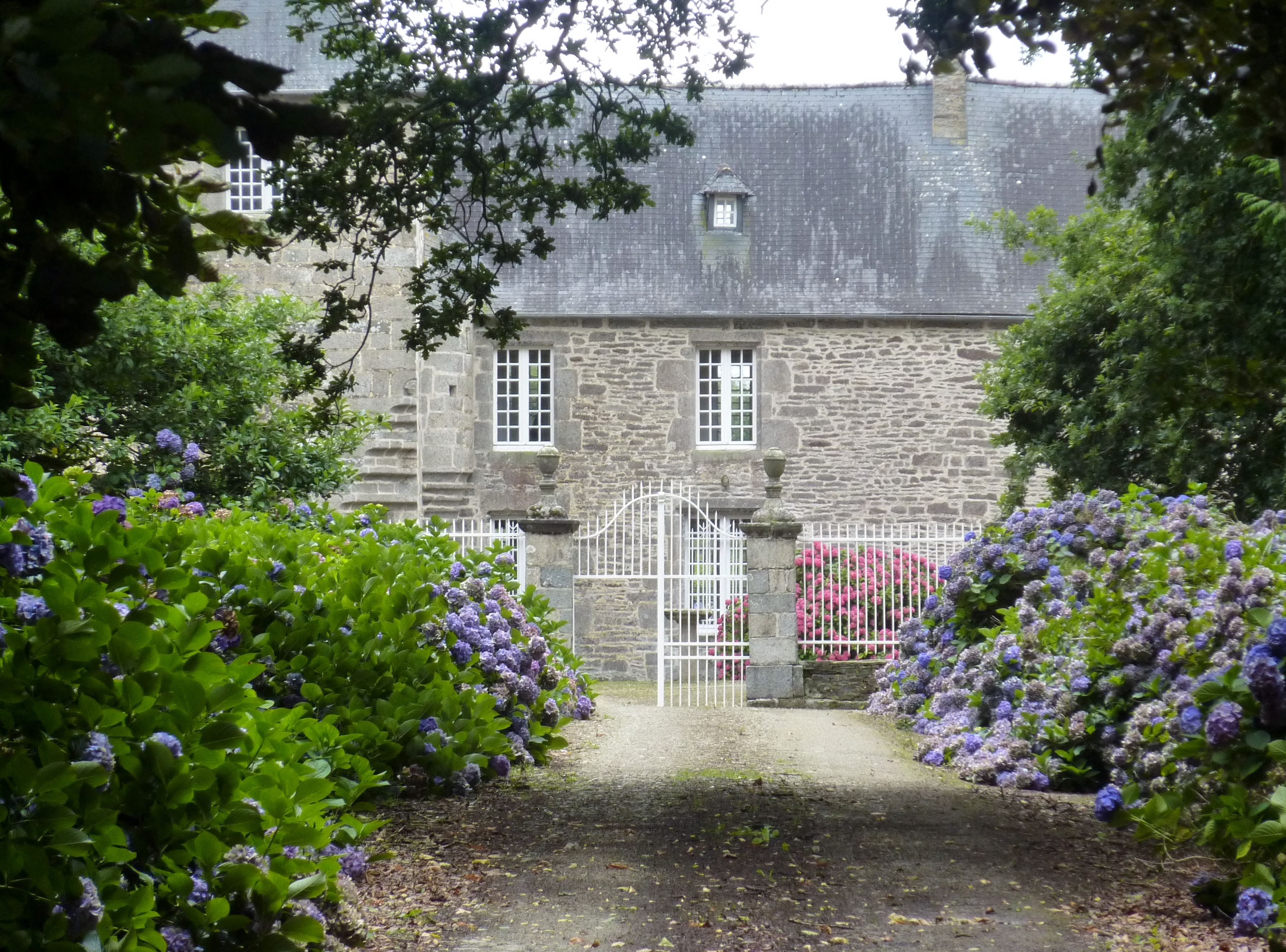 Plabennec : le manoir du Rest.